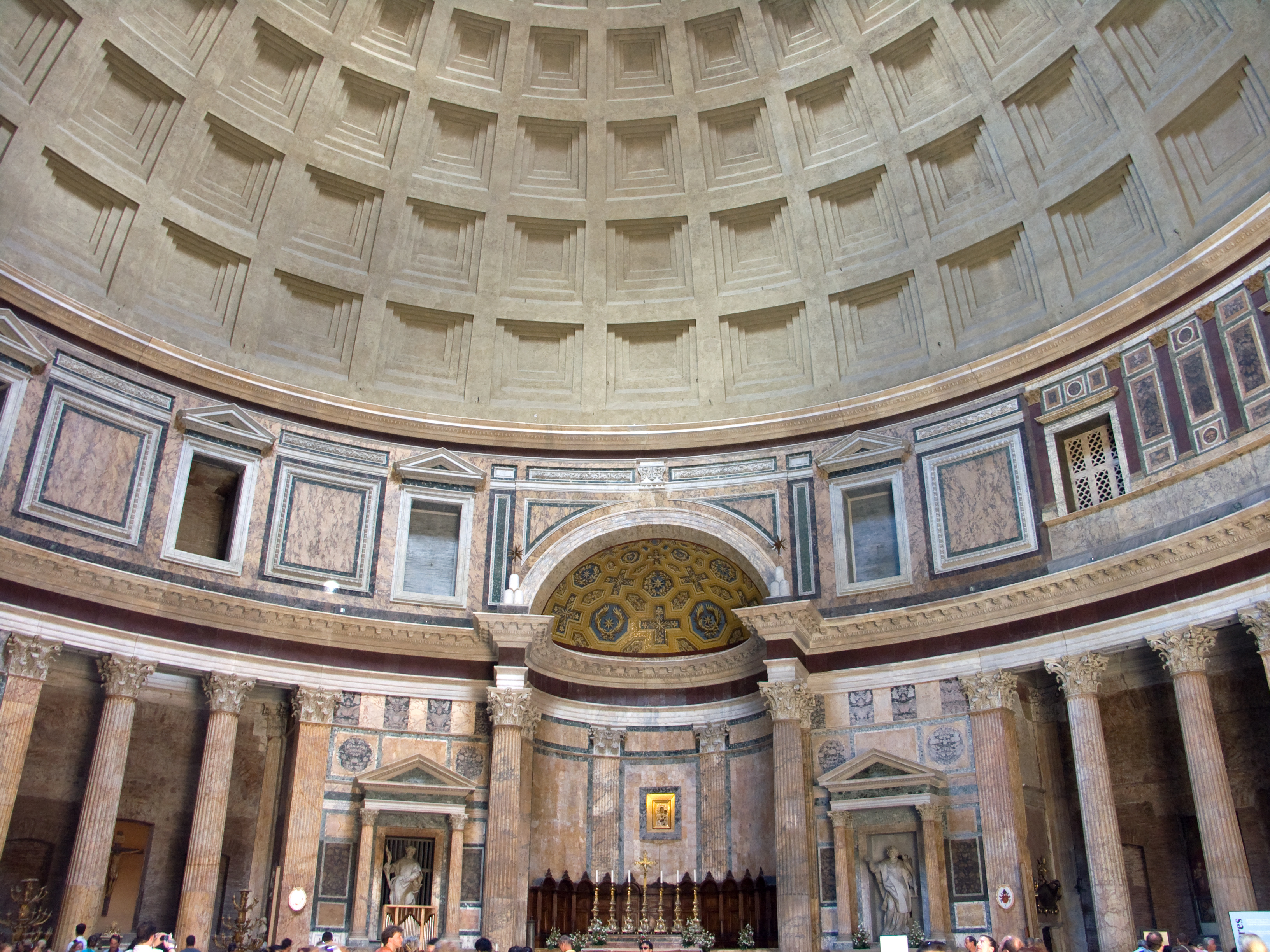 Intérieur du panteon à Rome